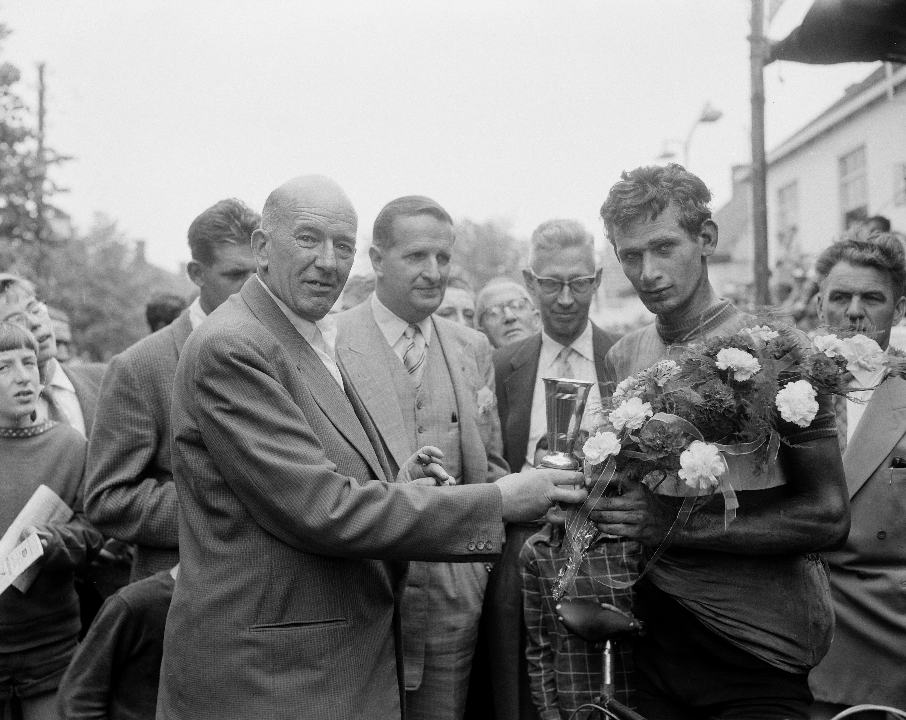 Collectie / Archief : Fotocollectie Anefo Reportage / Serie : [ onbekend ] Beschrijving : Acht van Chaam , internationale wielerwedstrijden. Winnaar van de amateurs Piet Steenvoorden Datum : 7 augustus 1957 Trefwoorden : AMATEURS, WIELERWEDSTRIJDEN, Winnaars Persoonsnaam : Acht van Chaam Fotograaf : Bilsen, Joop van / Anefo Auteursrechthebbende : Nationaal Archief Materiaalsoort : Negatief (zwart/wit) Nummer archiefinventaris : bekijk toegang 2.24.01.04 Bestanddeelnummer : 908-8443